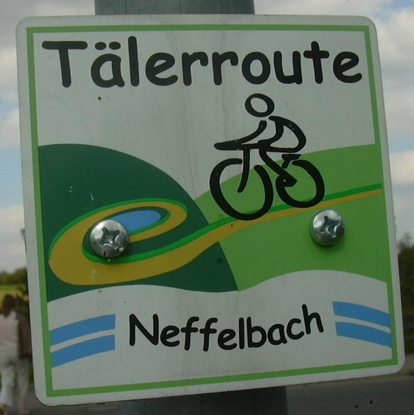 Taelerroute am Neffelbach